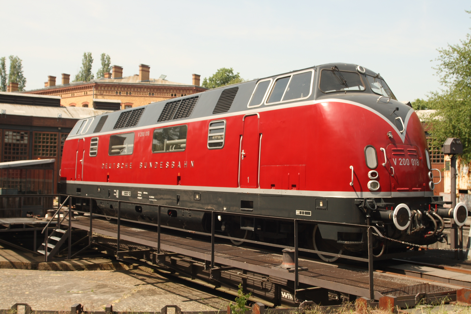 DB V 200 im Technikmuseum Berlin